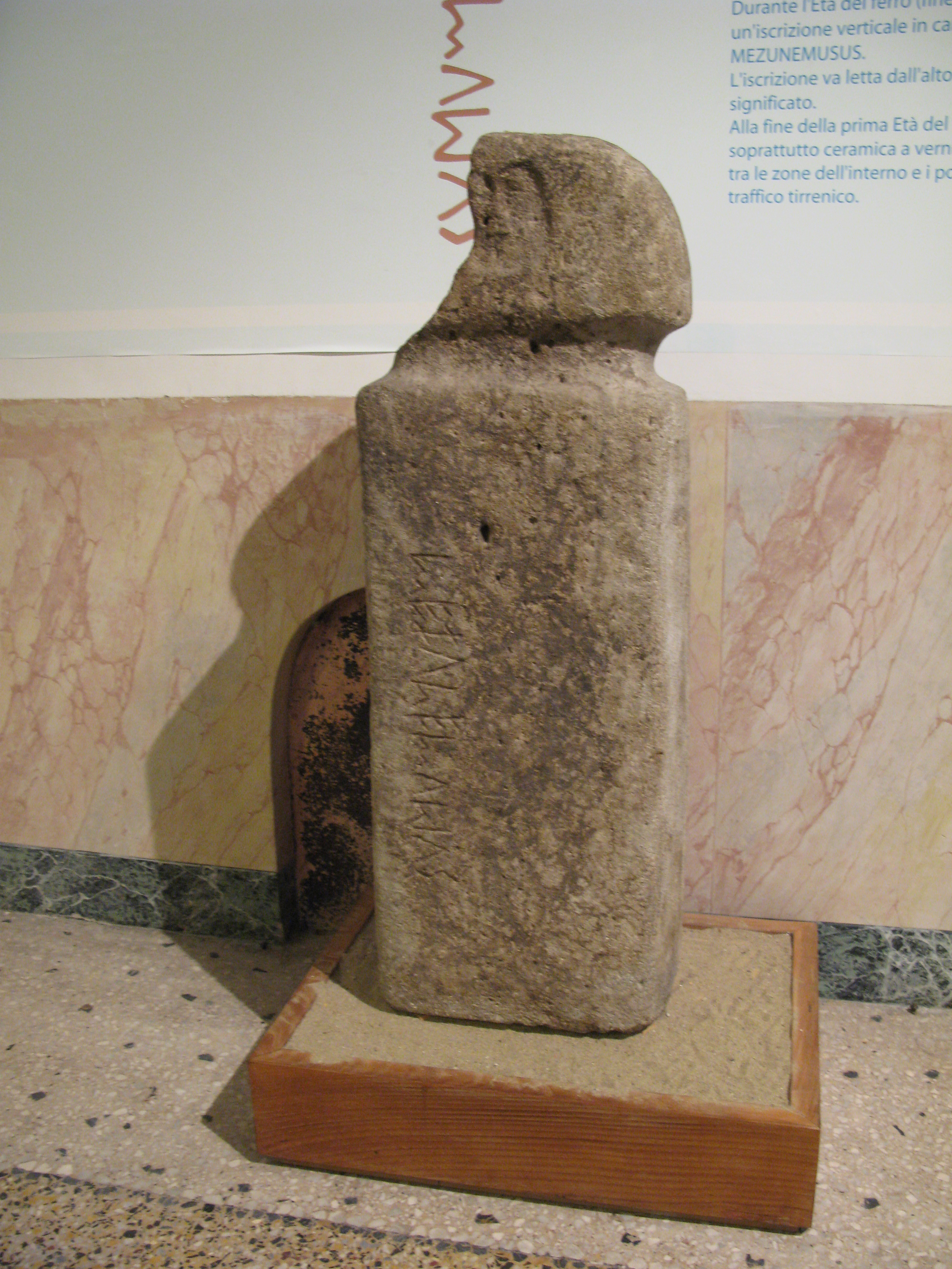 La statua stele di Zignago esposta al Museo di archeologia ligure di Genova Pegli, Liguria, Italia